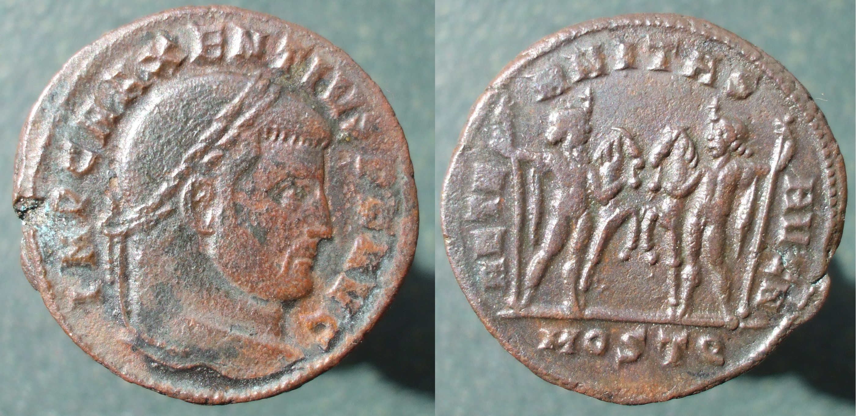 Maxence, nummus, Dioscures, Ostie, Tétrarchie